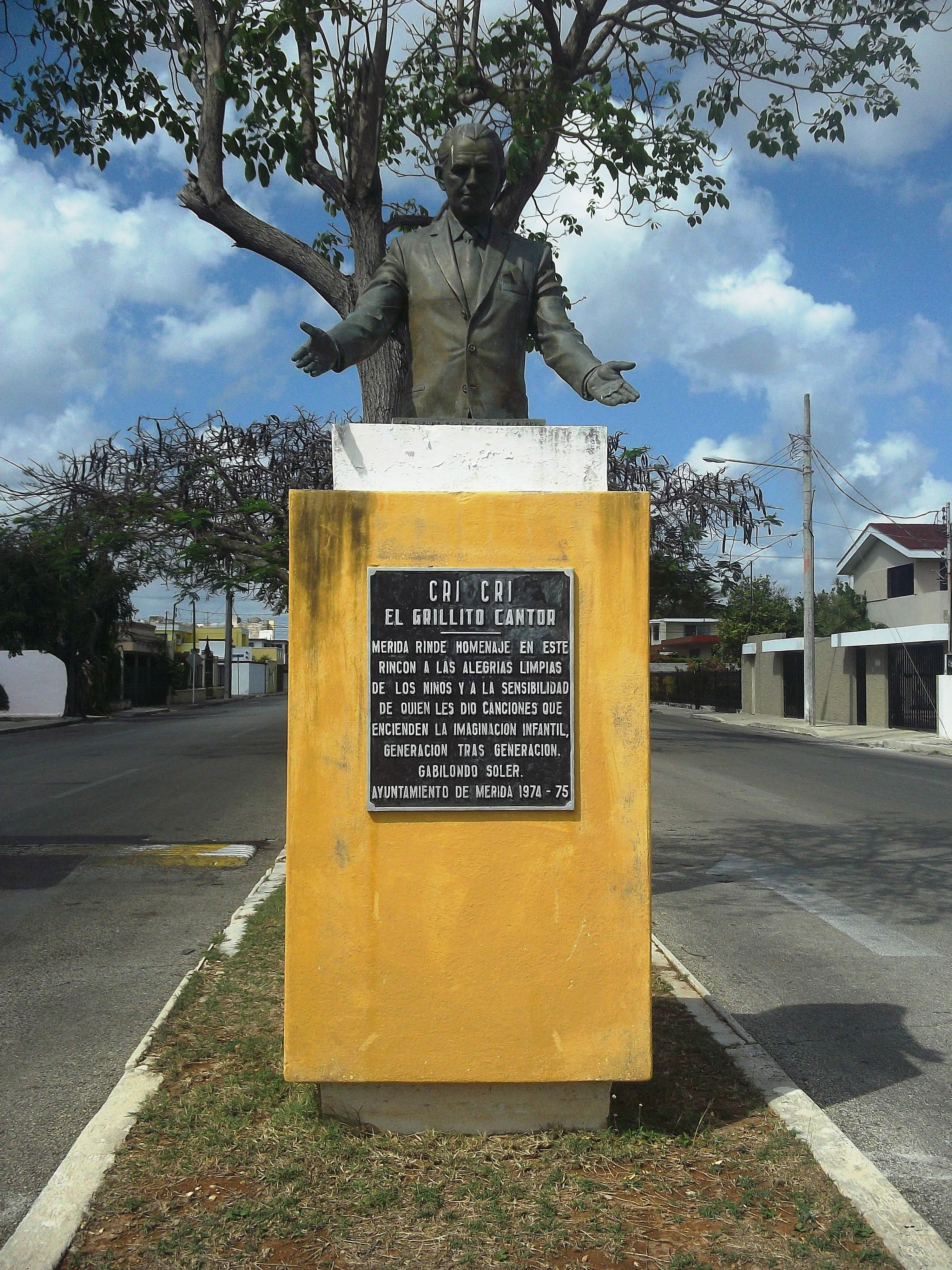 Monumento a Francisco Gabilondo Soler en Mérida, Yucatán.